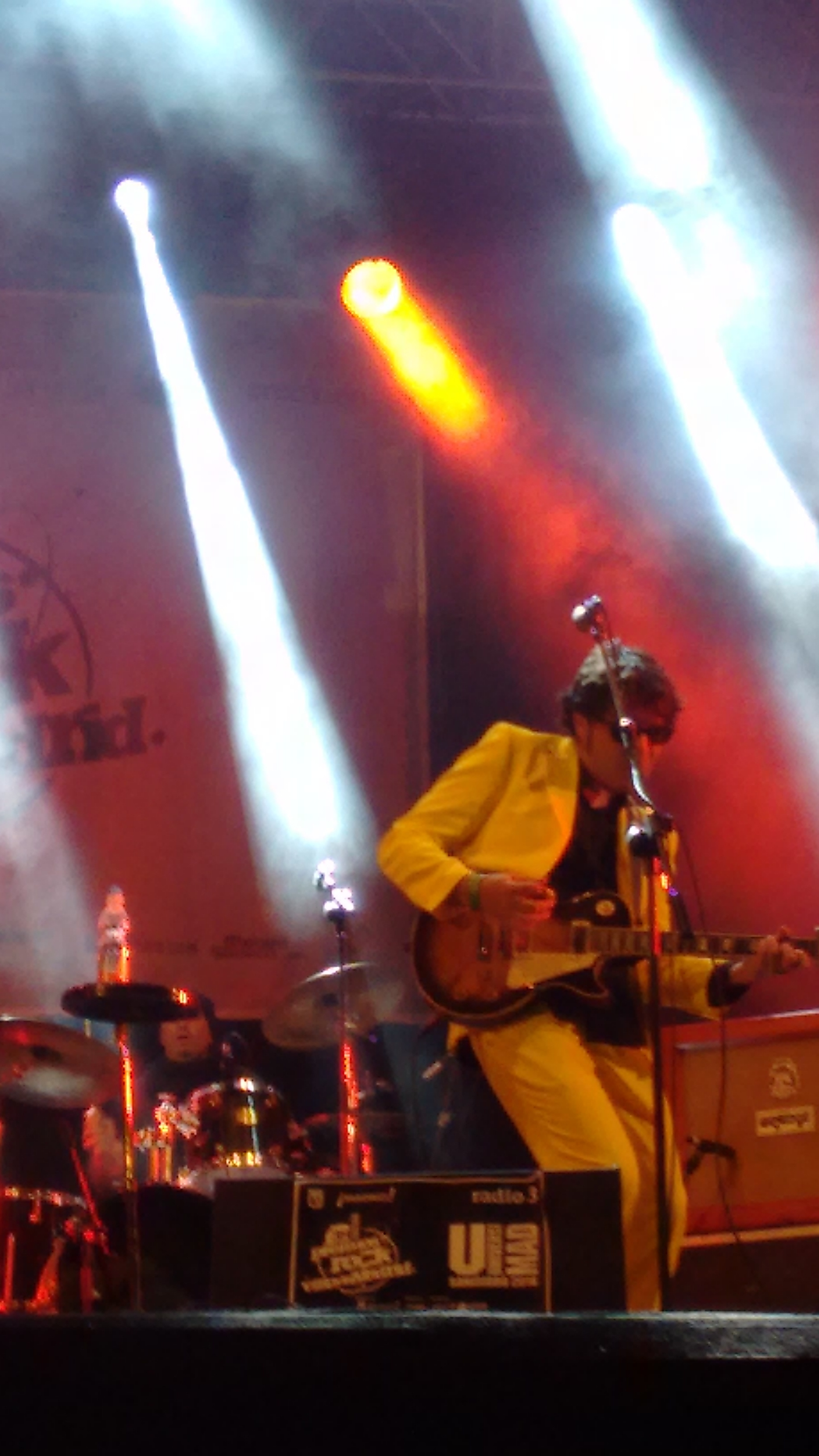 Radio3